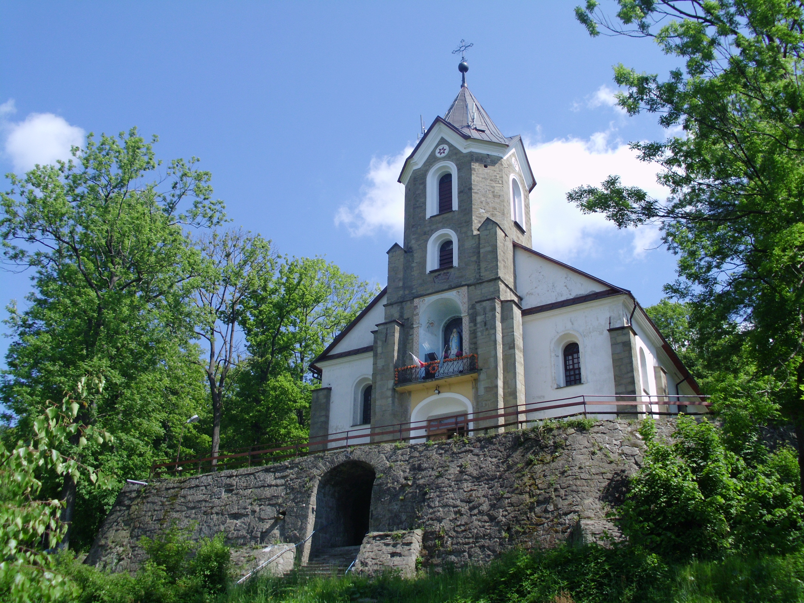 Kościół odpustowy na Jasnej Górce - Gmina Ślemień, rok 2011